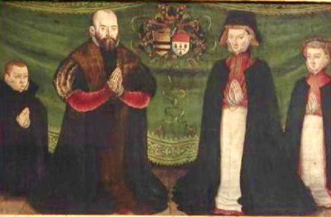 Epitaph um 1571 mit Auferstehung Jesu-Szene (Detail mit Porträt des Stifterehepaares, dessen Allianzwappen und dessen Kindern), ehemals Danziger Marienkirche, Sankt Georgs-Kapelle